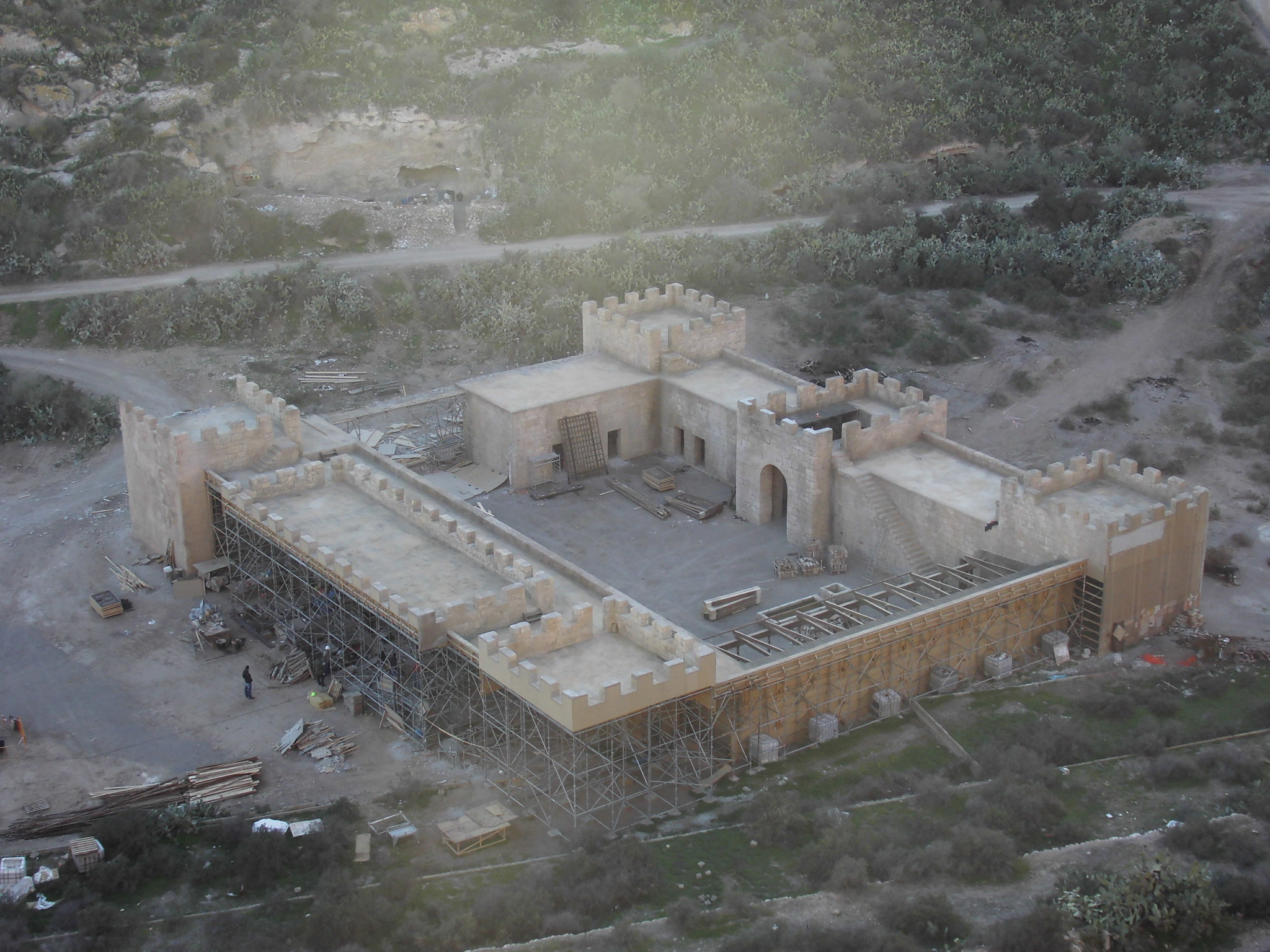 Detalle del montaje para el castillo residencia de Pilatos para la película Resucitado, poco antes de ser demolido.